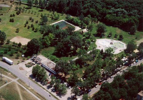 Lakitelek_Tőserdő, Hungary, aerialphotography